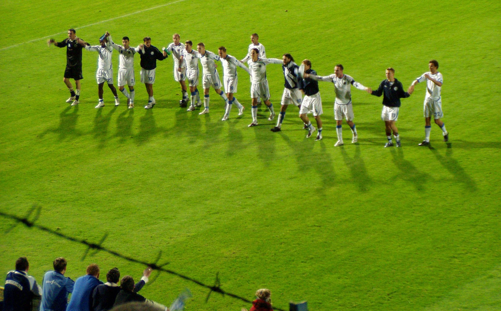 A ZTE csapata egy győztes mérkőzés után a ZTE-Arénában